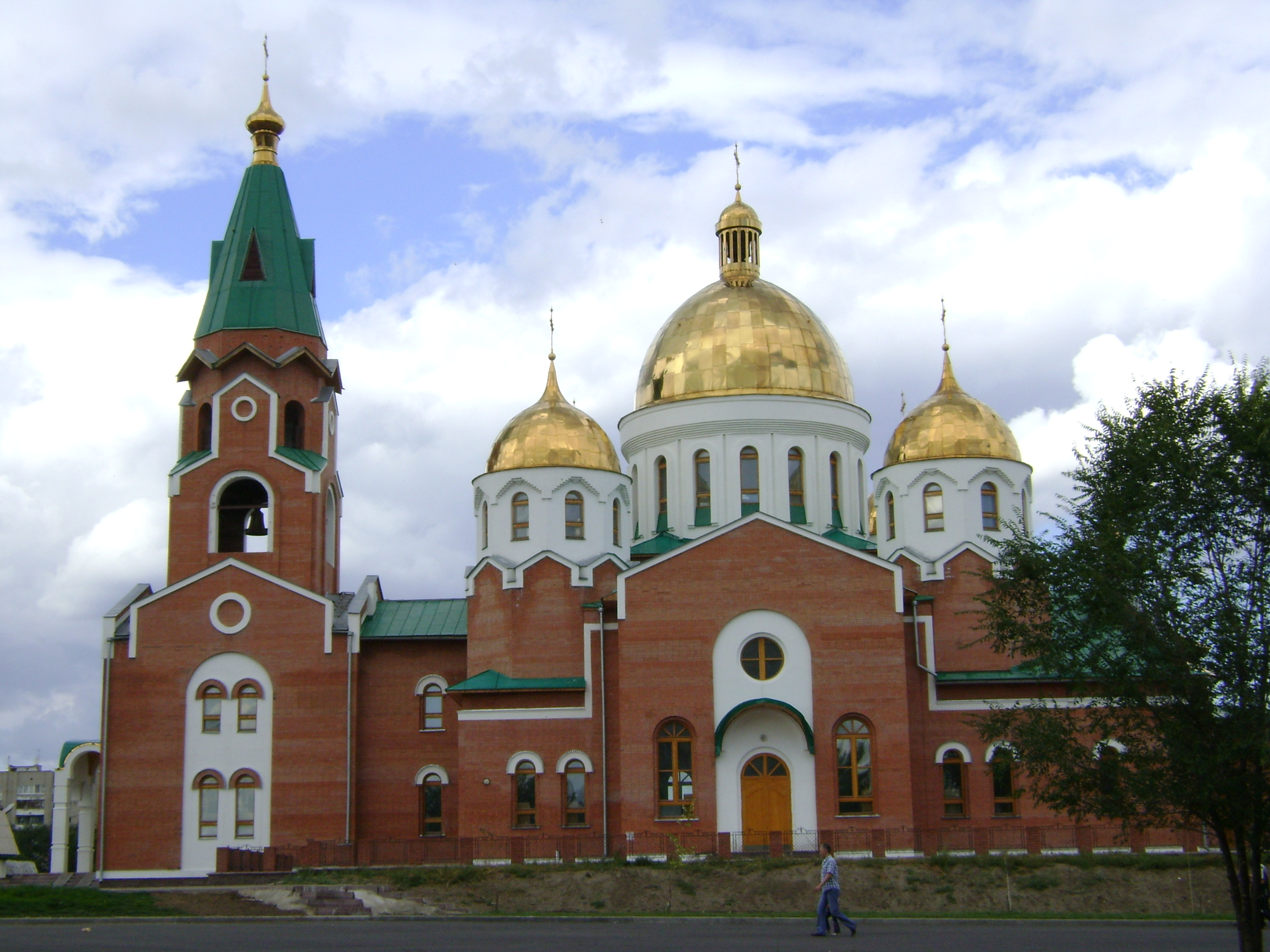 Храм в Усть-Каменогорске